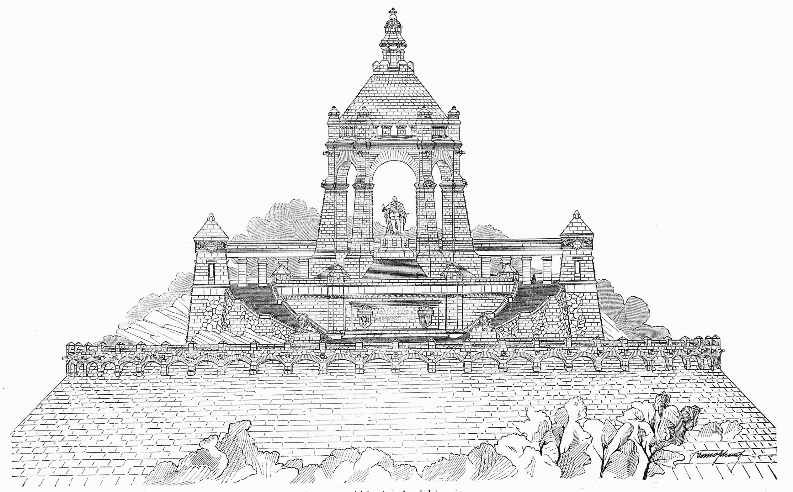 Kaiser-Wilhelm-Denkmal an der Porta Westfalica, Zeichnung von Bruno Schmitz